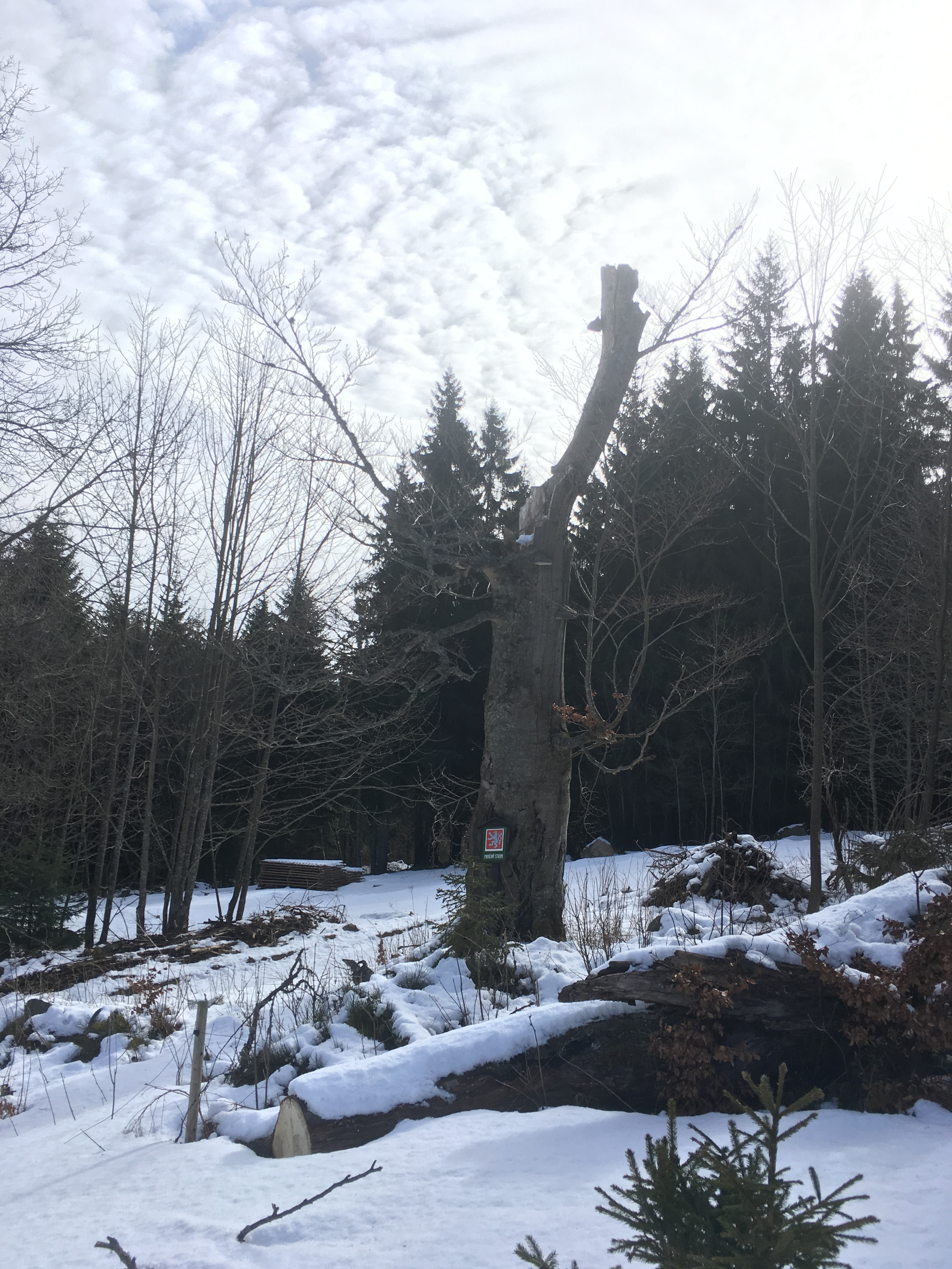 Buk v Horní Sněžné